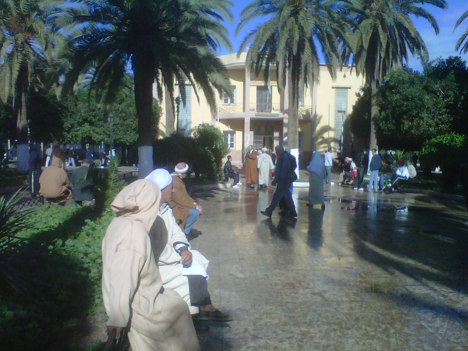 Place 1er Novemebre Face Mairie Mohammadia Mascara Algérie